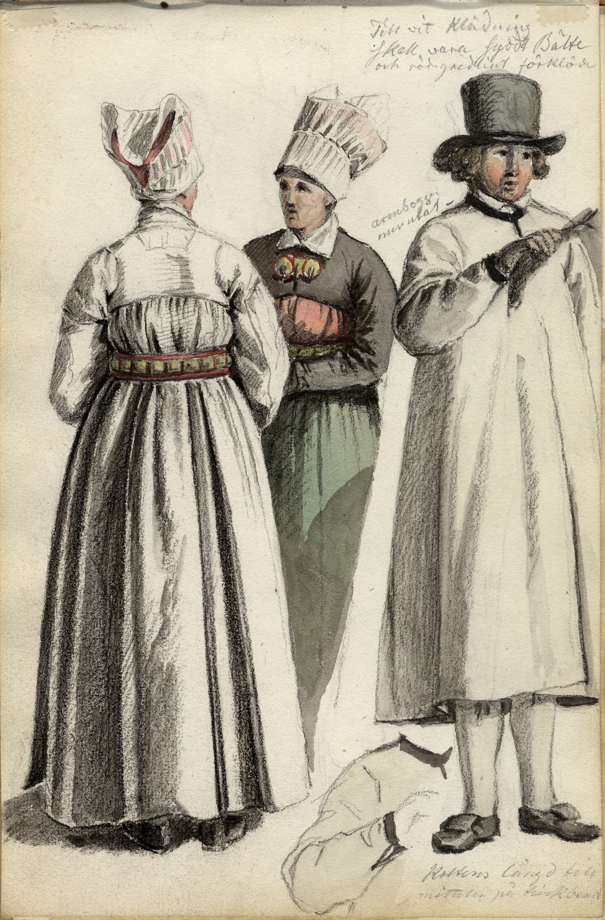 Akvarell. Två kvinnor och en man.Vingåker. En av kvinnorna med ryggen mot betraktaren. Hon är iklädd helvit dräkt, den andra bär grön kjol med svart jacka och rött liv däremellan. "Till vit klädning skal vara Sydt (?) Bälte och rödgredelint (?) förkläde". Man längst t.h i bild. Detaljskiss av ärm och krage. Text mkt svårläst. Skiss ur en skissbok av Johan Gustaf Sandberg, Nordiska museets arkiv. Invnr: NM.0080508